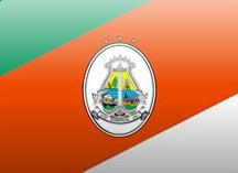 Bandeira da cidade de Teutônia